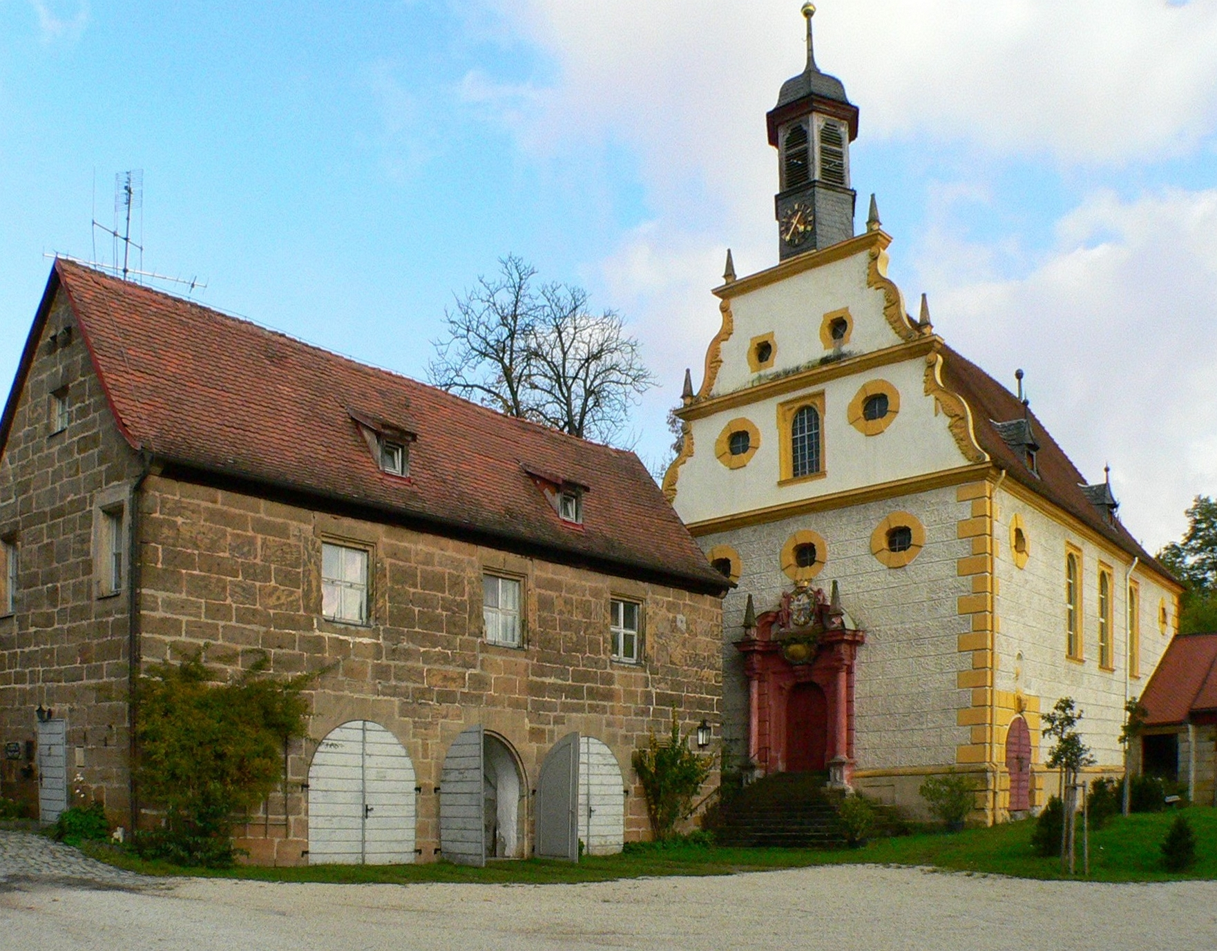 Schloss Eyrichshof bei Ebern (Bayern), Pfarrhaus und Schlosskirche